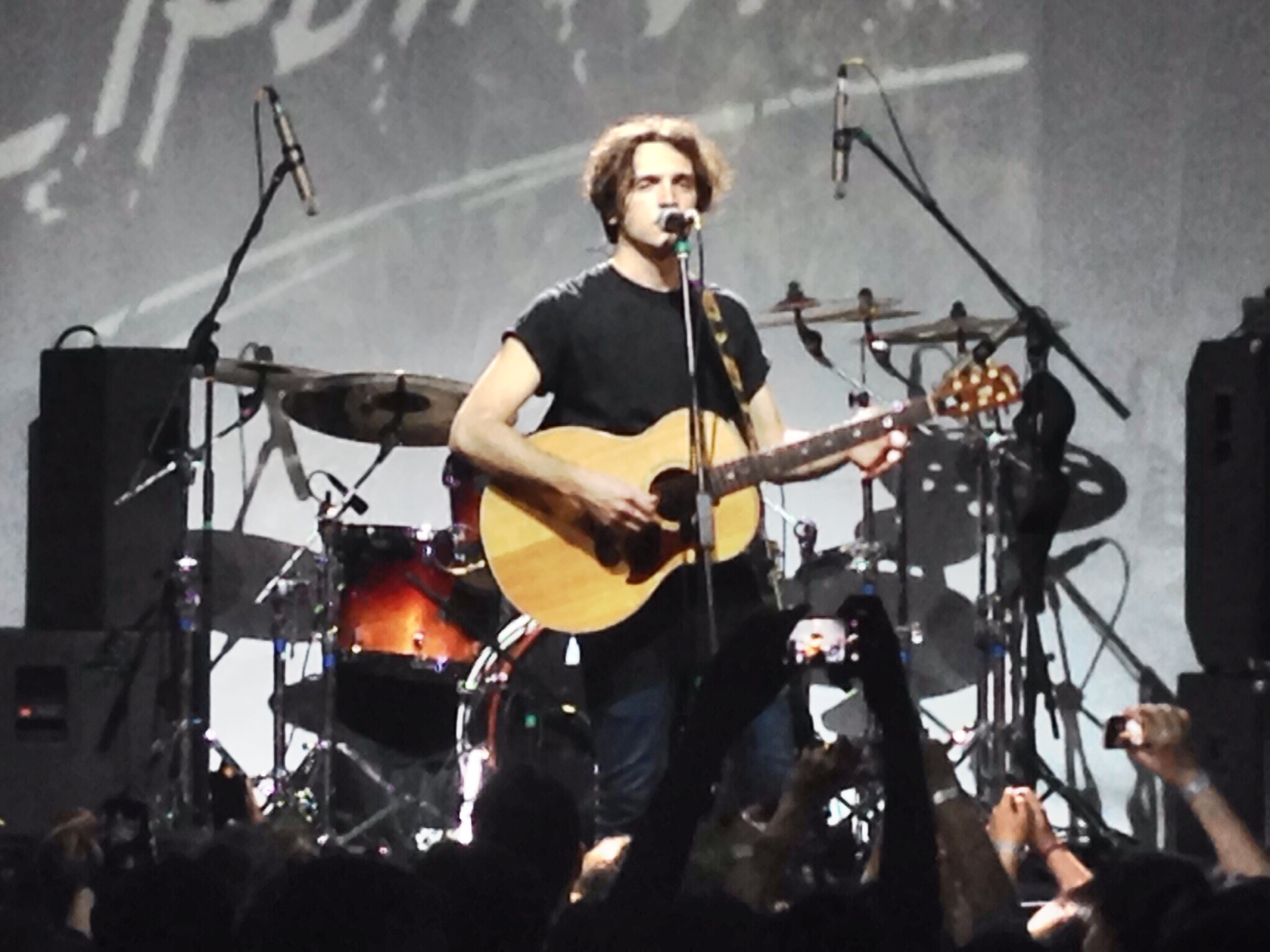 Валентин Стрыкало в Зелёном театре